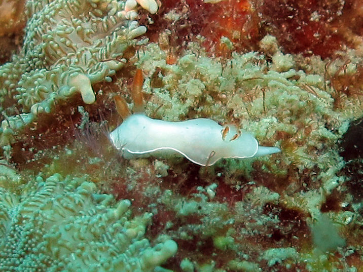 Ardeadoris angustolutea, Koh Phangan, Tailandia